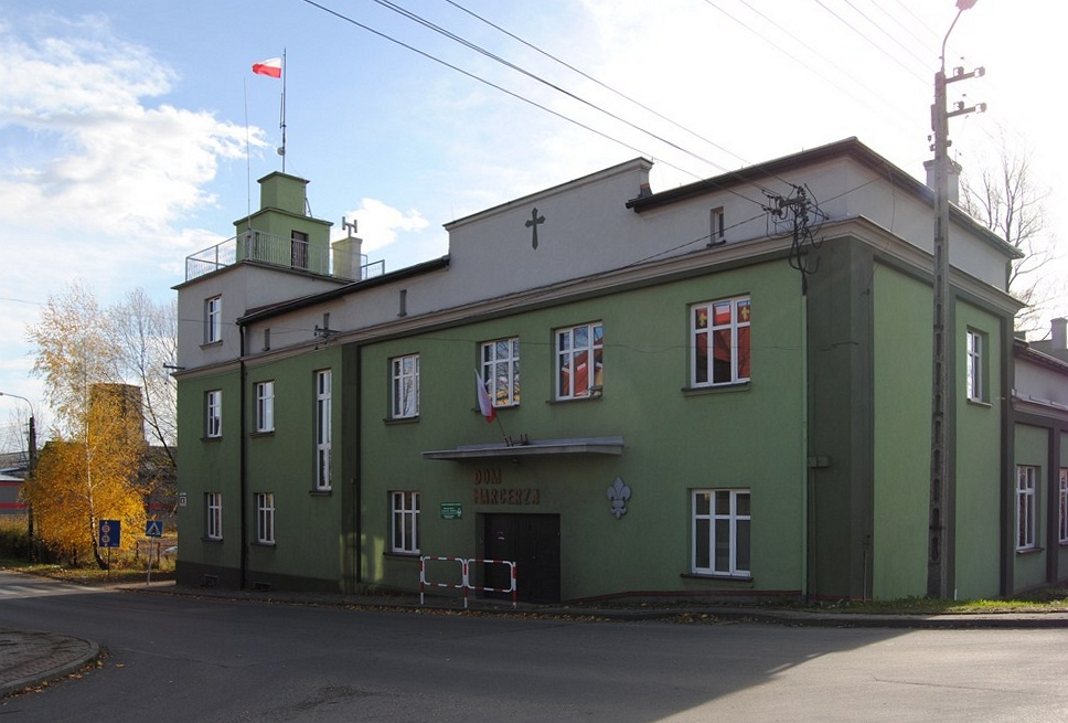 Budynek Domu Harcerza w Czechowicach-Dziedzicach przy ul. Narutowicza 4